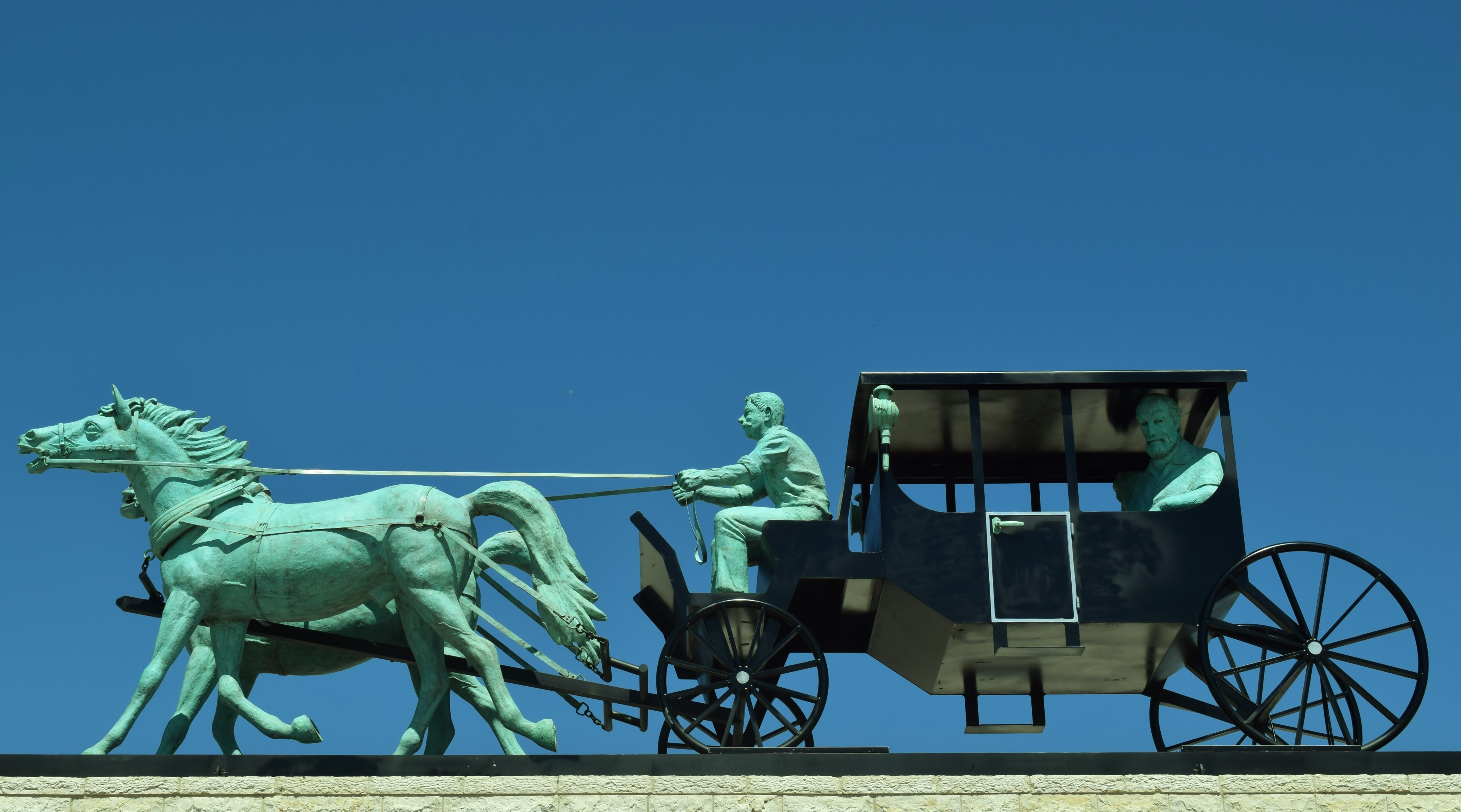 פסל: אסף ליפשיץ